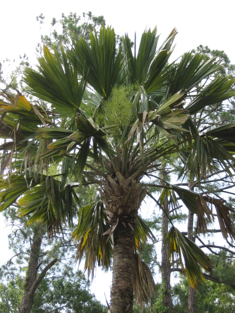 Sabal palmetto 'Lisa'